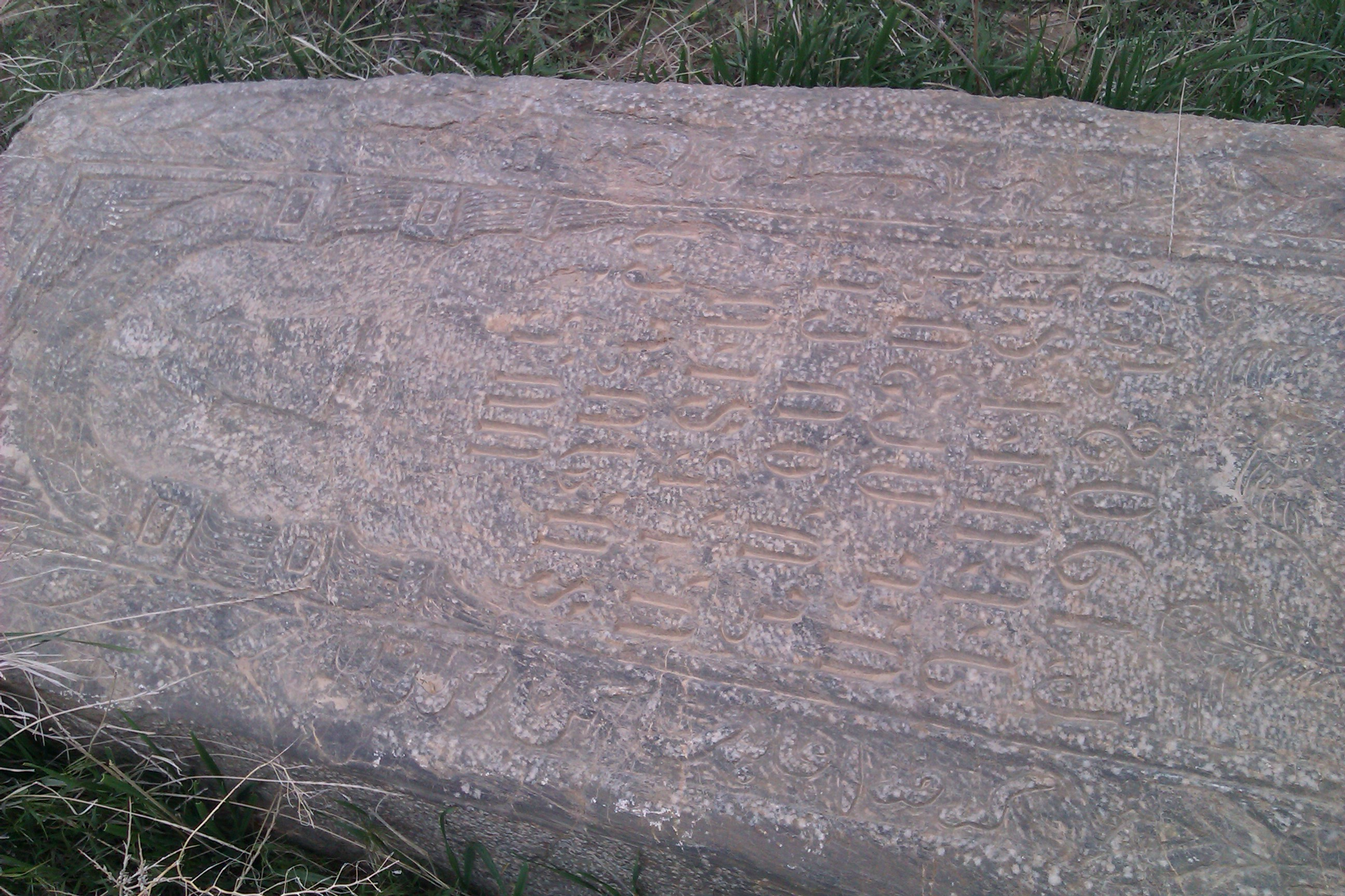 این سنگ نوشته ها مربوط به ساکنین قدیم روستای فرج آباد (ارامنه) میباشد که سالها پیش از این منطقه مهاجرت نموده و برخی از انان ساکن مجیدیه تهران می باشند